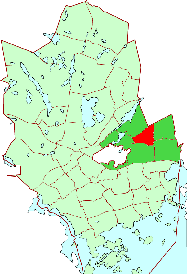 Karakallio/Karabacka district in Espoo city